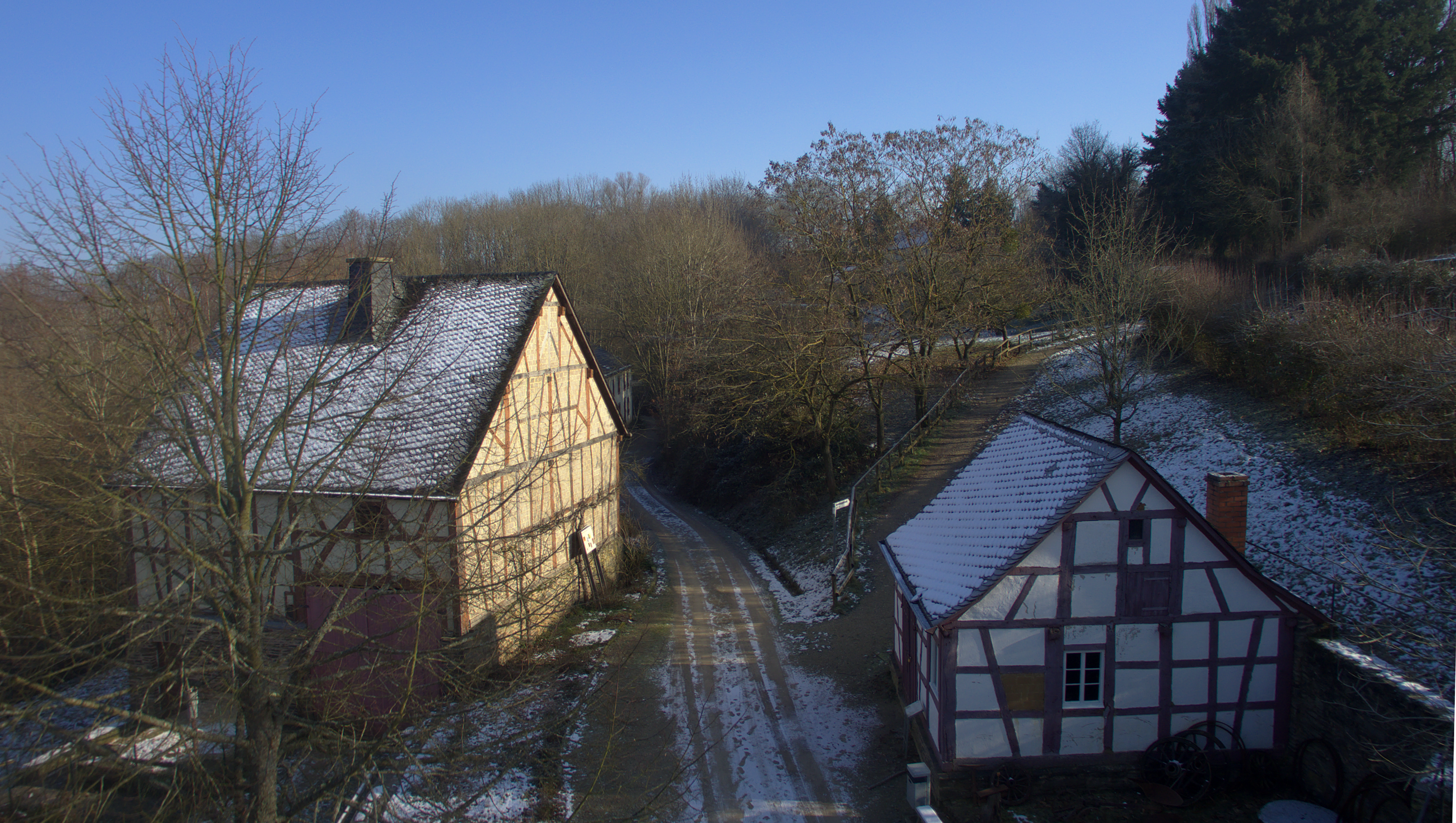 Schmiede und Stallscheune im Freilichtmuseum Roscheider Hof, Konz im Winter 2016